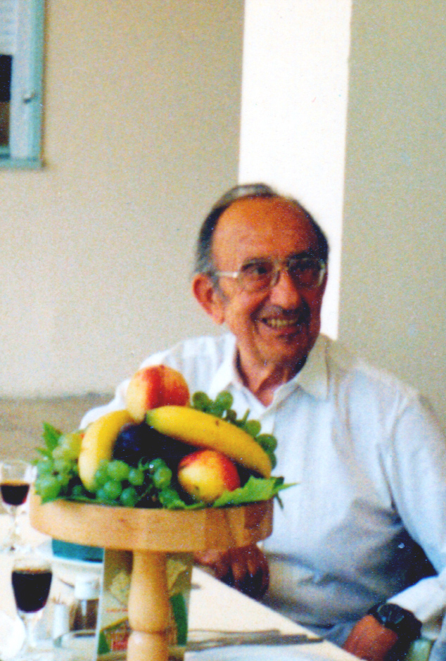 Pataki Ferenc Dombóváron